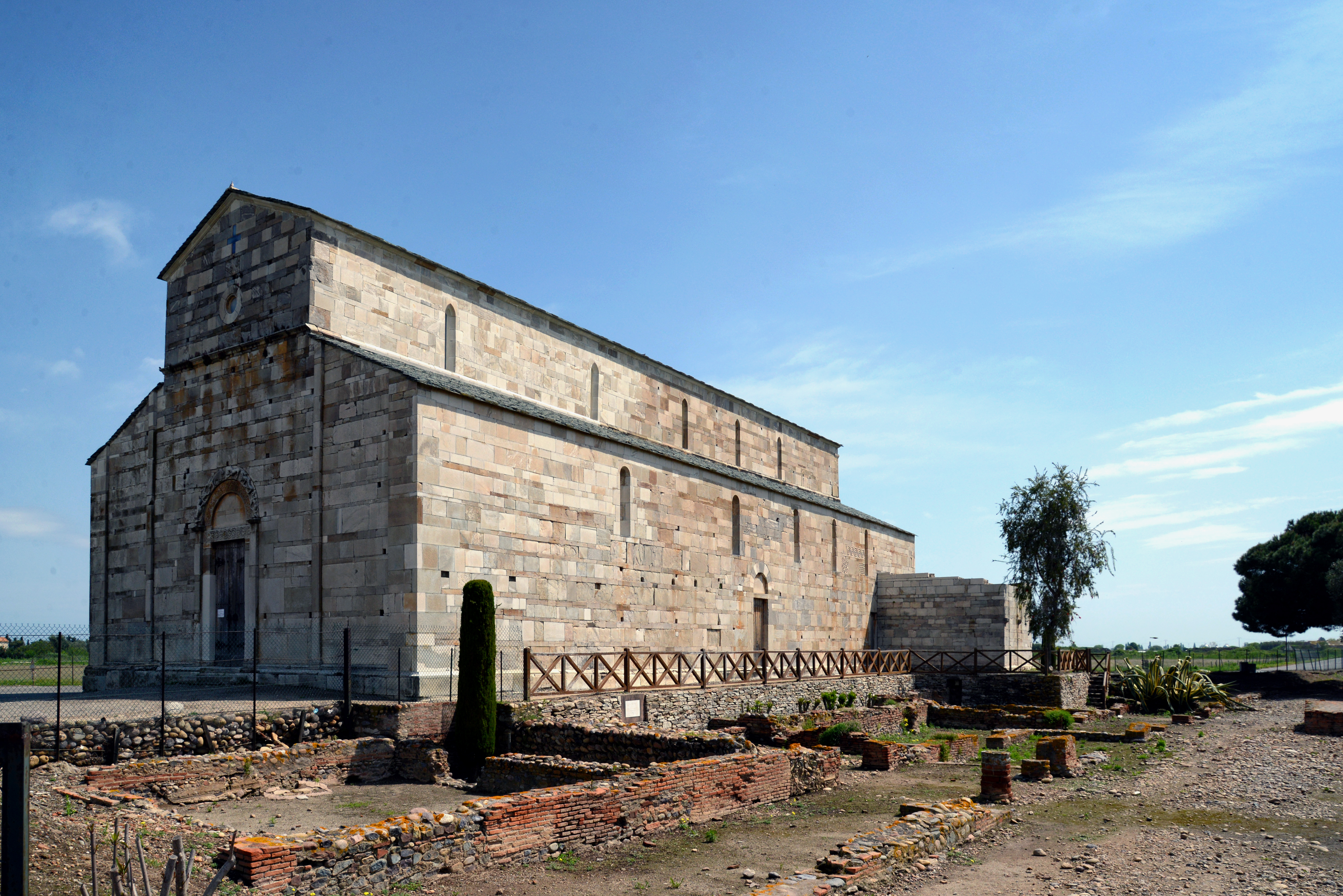 Lucciana, La Marana (Corse) - Cathédrale Santa-Maria-Assunta et le site archéologique de la colonie romaine de Mariana à la Canonica.